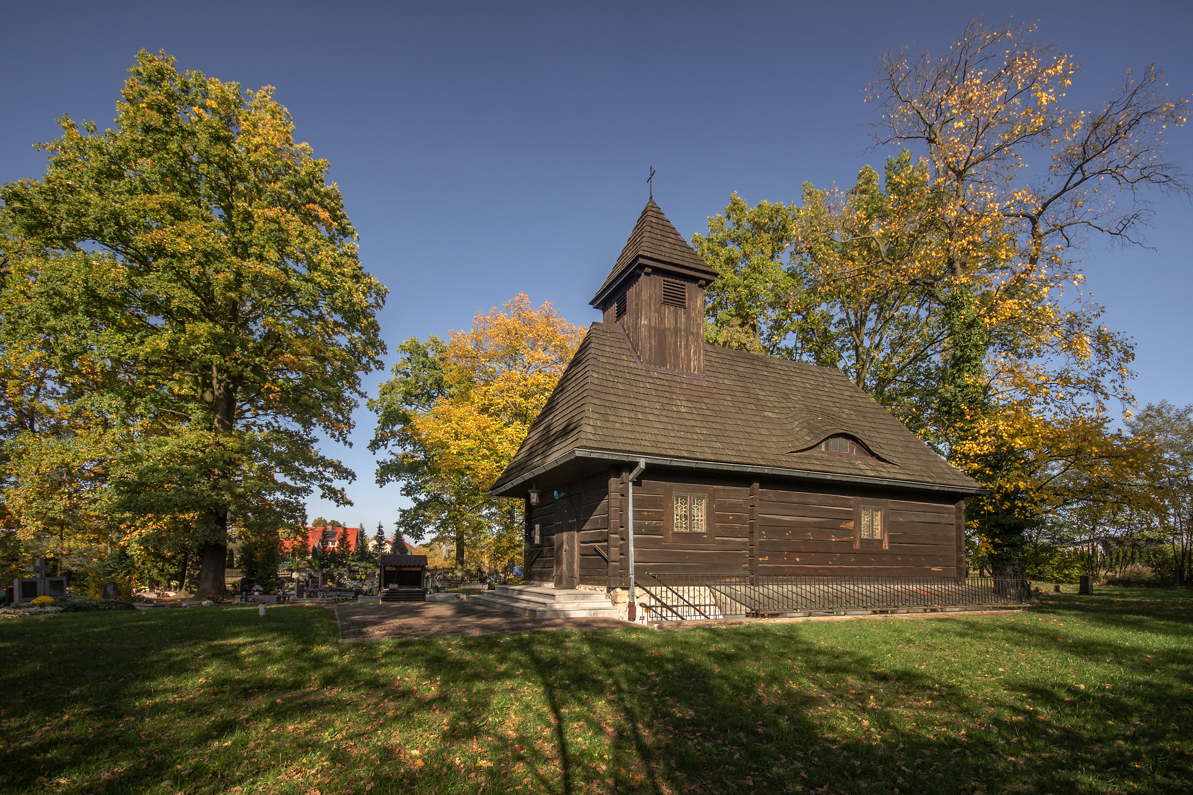 Ligota Górna, kaplica cmentarna, 1787